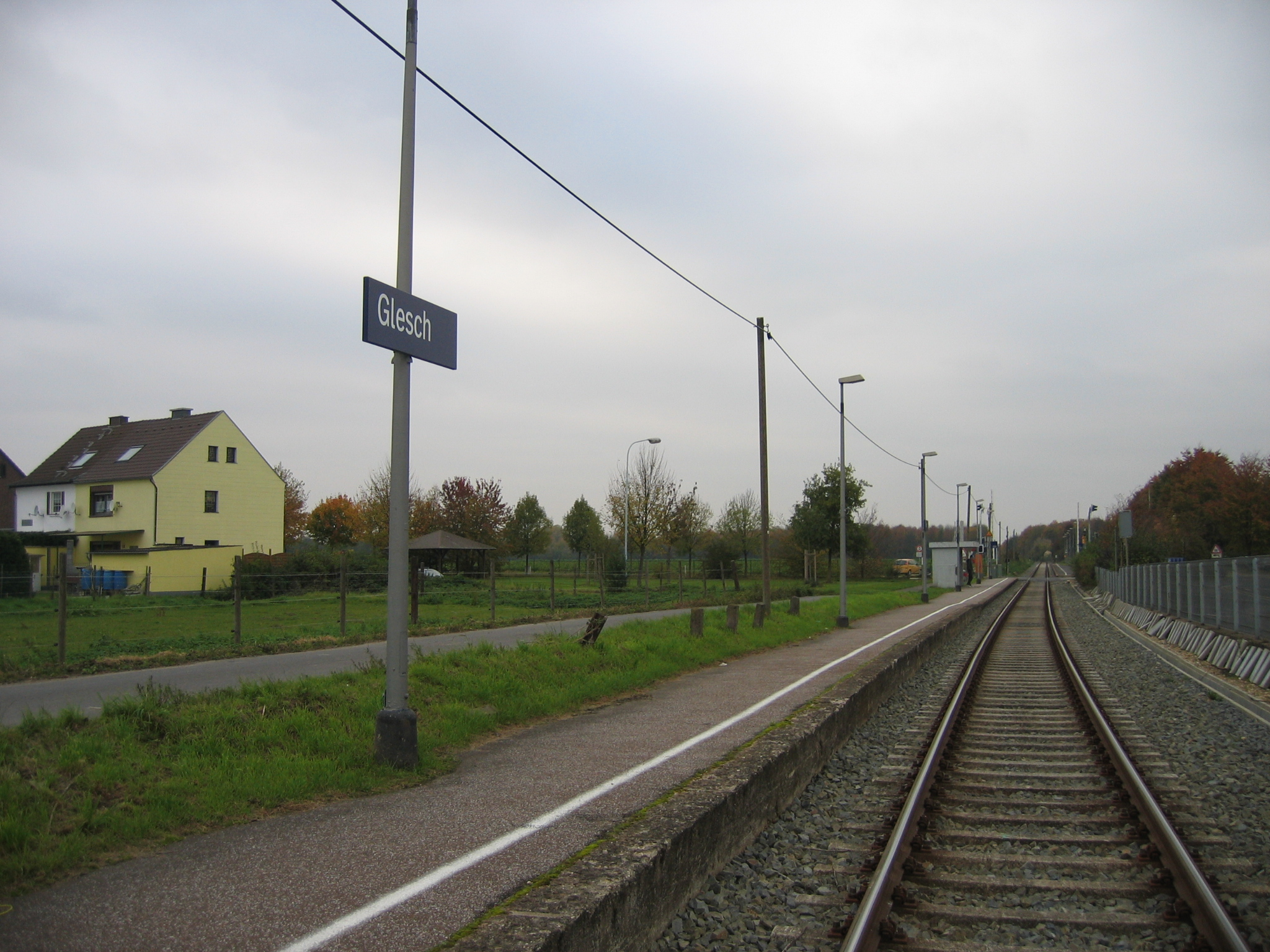 Bahnhof Glesch an der Erftbahn